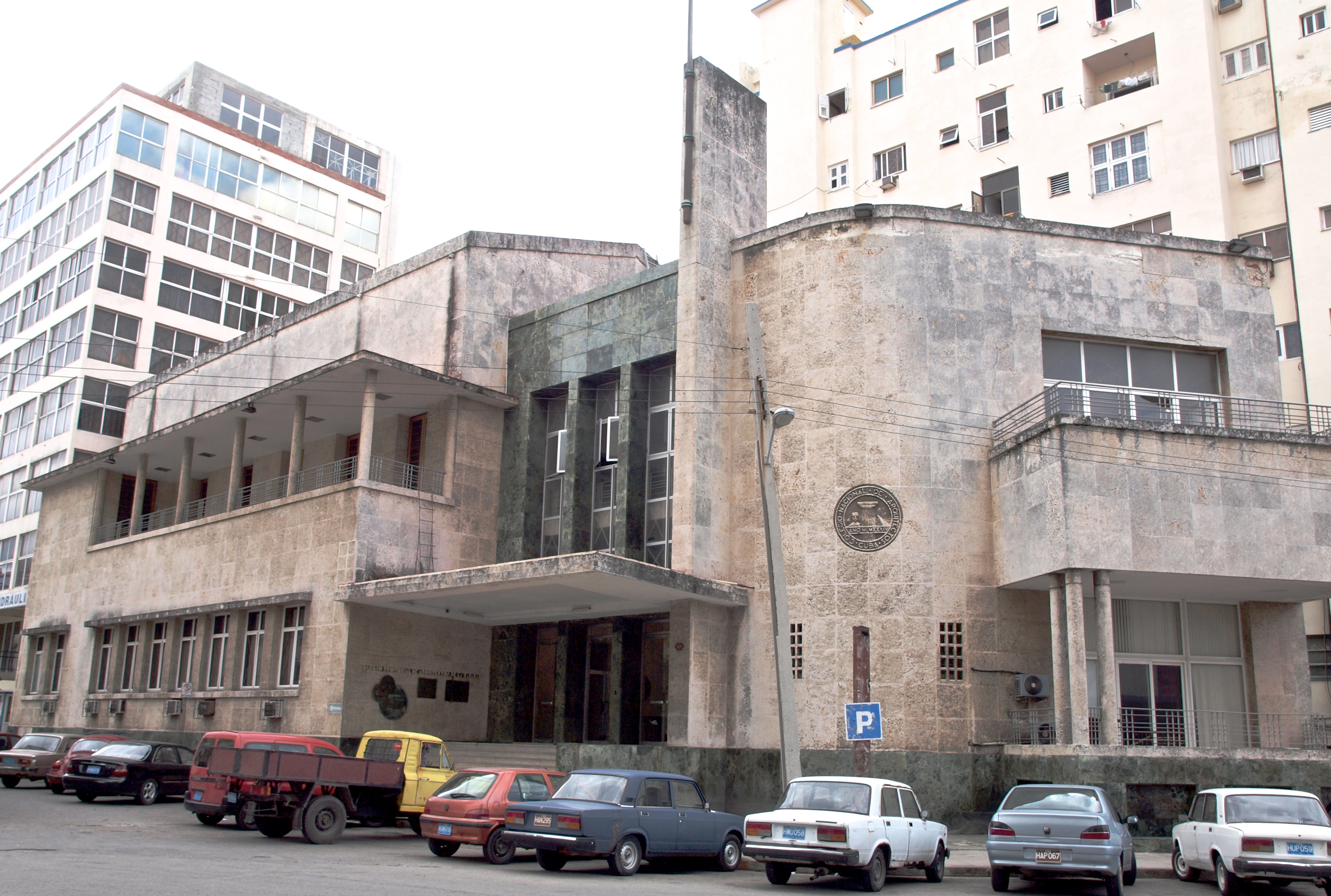 Art Deco architecture in Havana. Colegio de Arquitectos (1947),by Fernando de Zárraga & Mario Esquiroz.